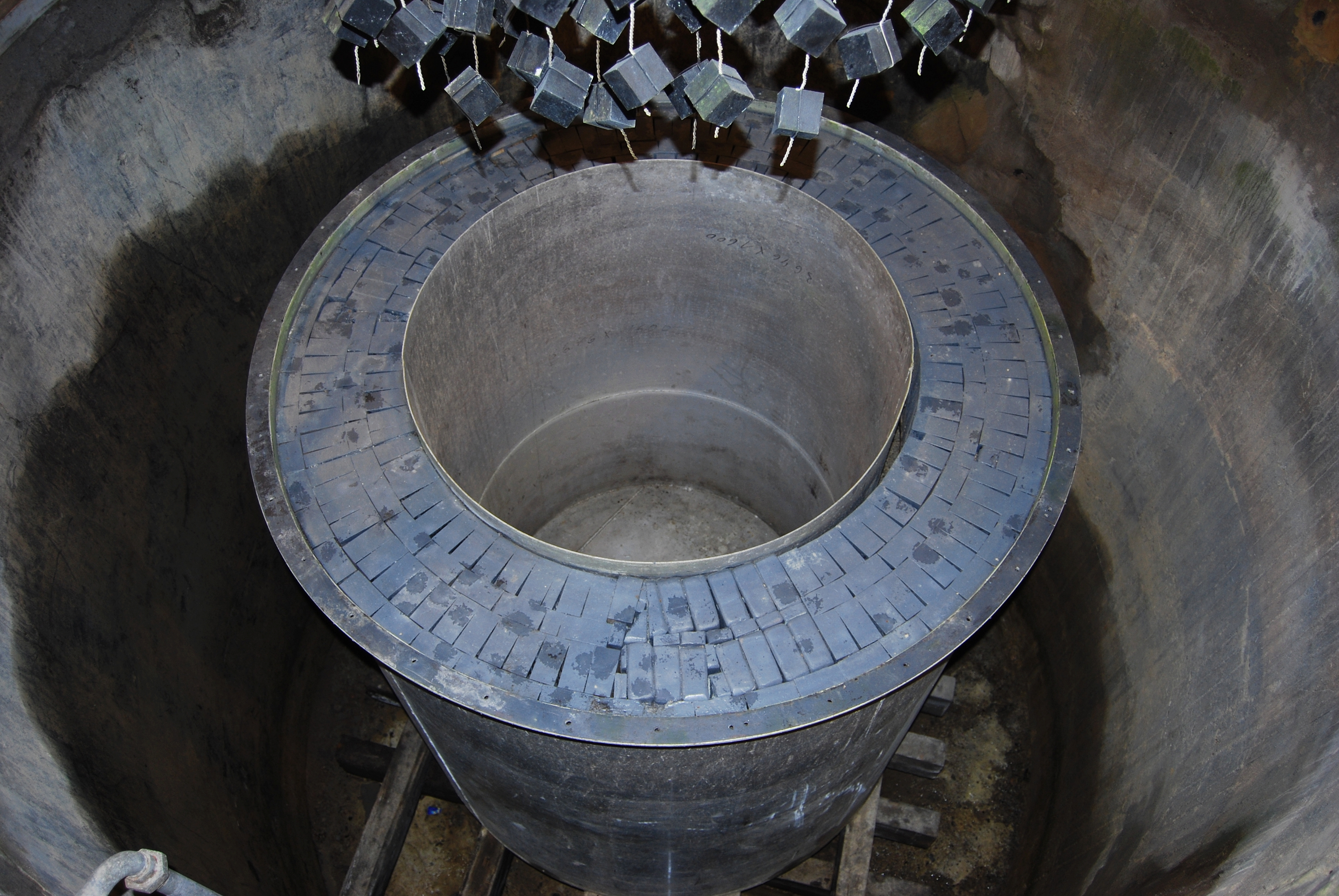 Das Reaktorinnere in Haigerloch, oben die hängenden Uranwürfel